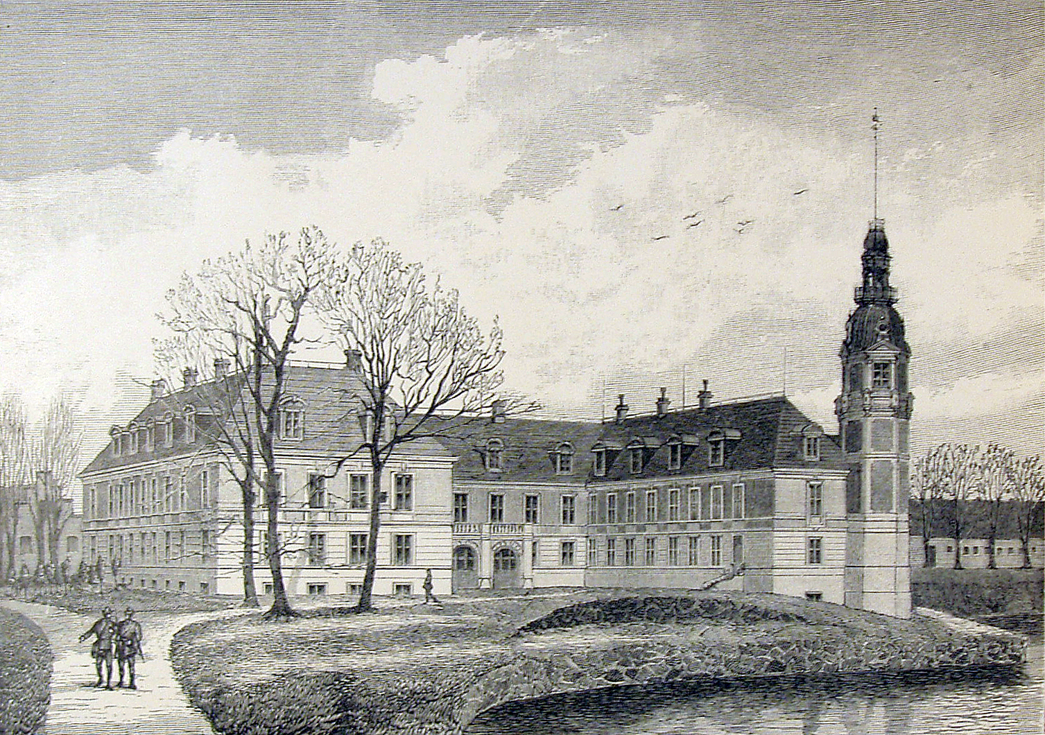 Hvedholm Slot efter ombygningen i 1878-1882 ved arkitekten Johan Schrøder